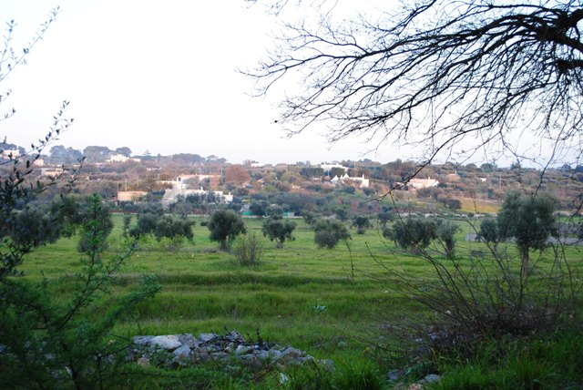 Paesaggio nella campagna di Monopoli, Bari contrada San Gerardo, strada per Cristo Cozzana